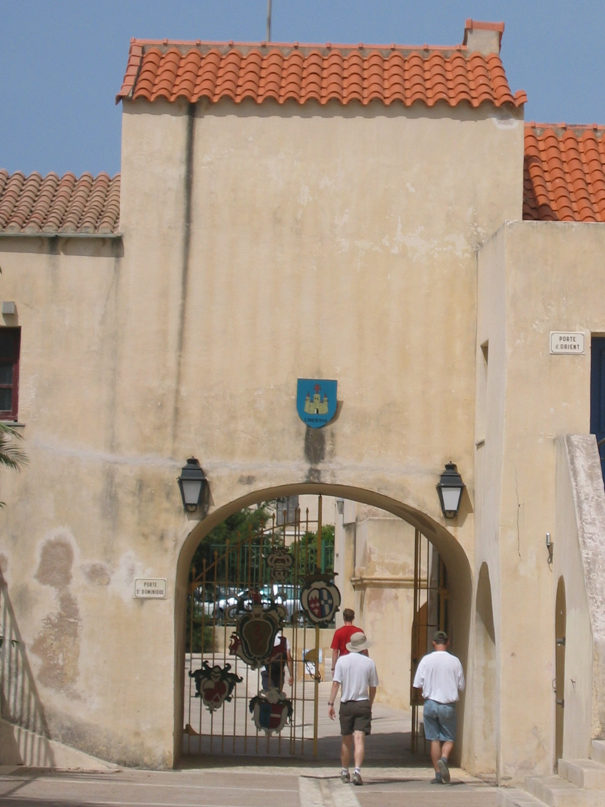 Bonifacio (Corse-du-Sud, France)